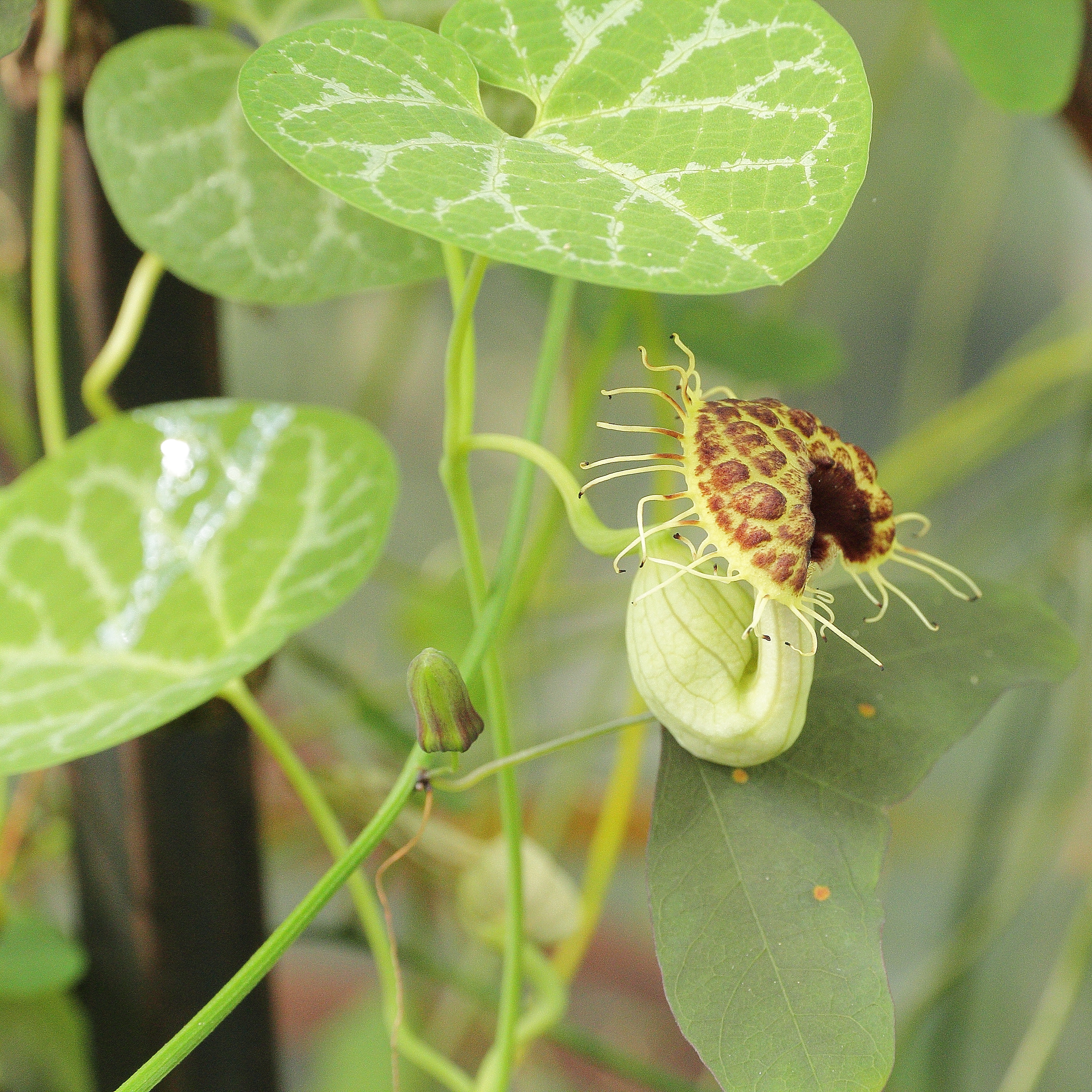 Aristolochia fimbriata i Göteborgs Botaniska Trädgård.